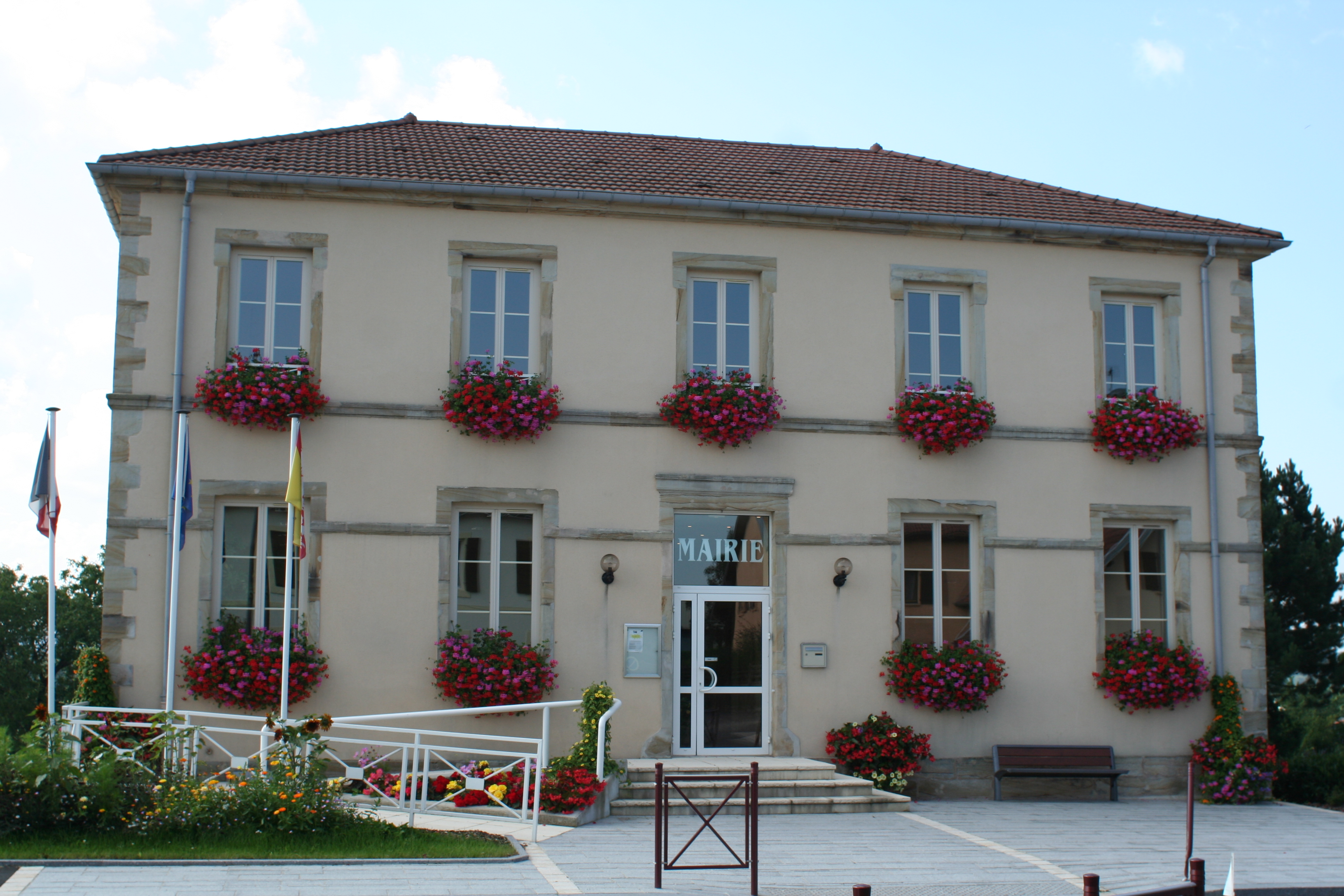 Mairie de Jeanménil (Vosges)